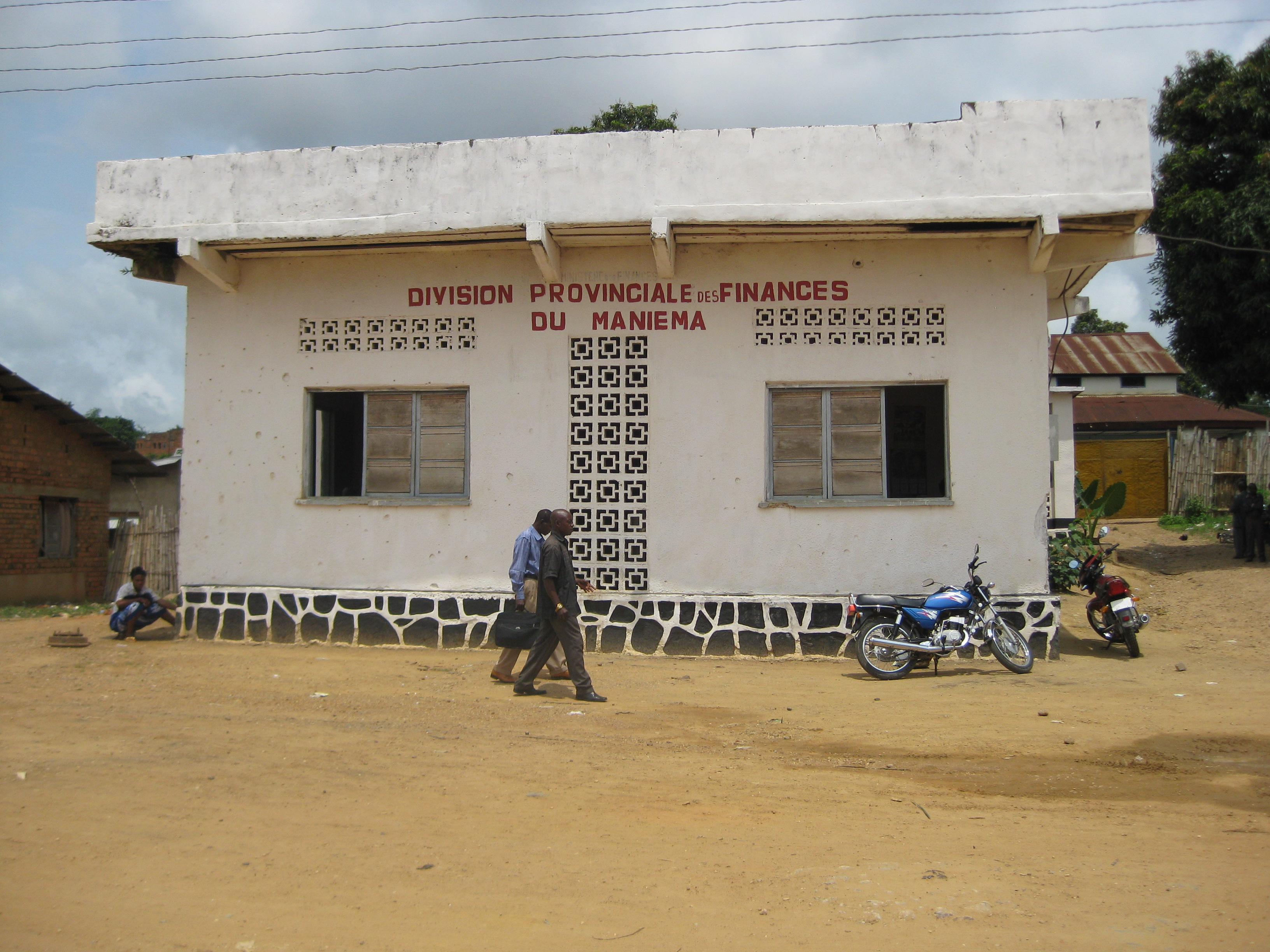 La direction provinciale des finances